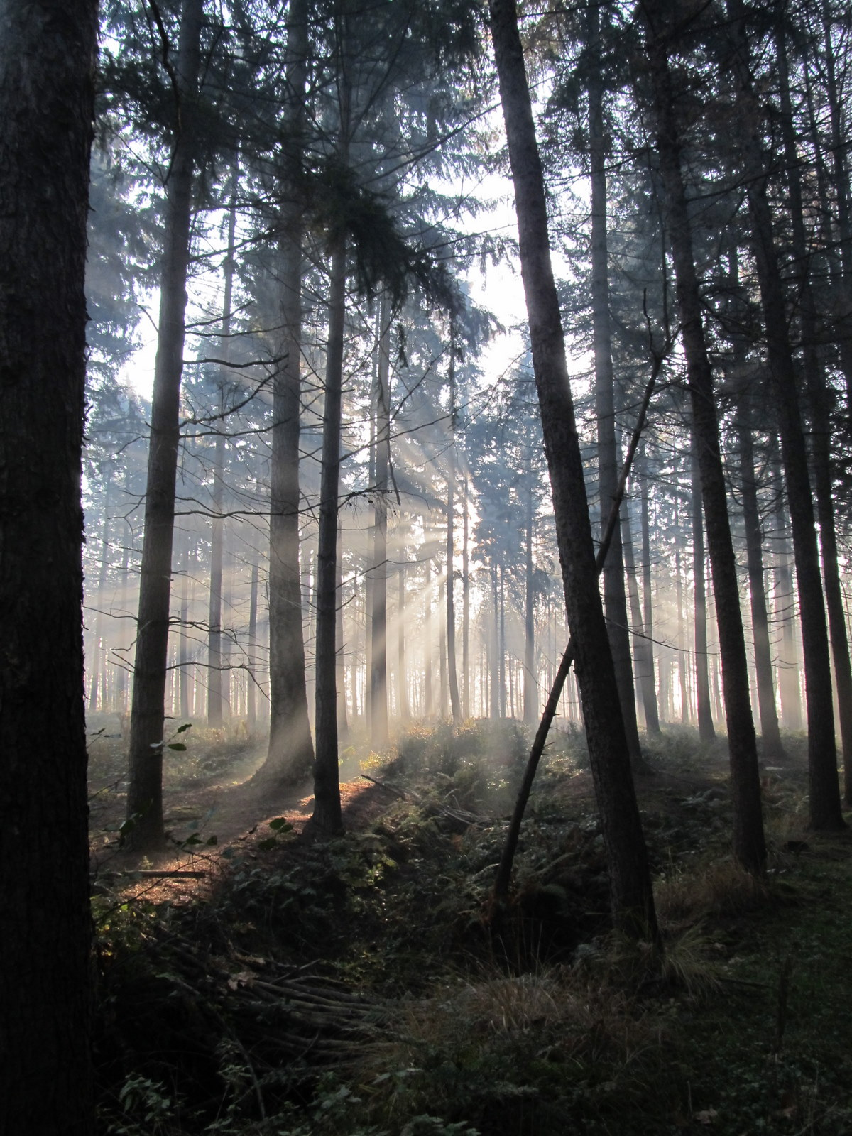 20111120 Hospicebossen